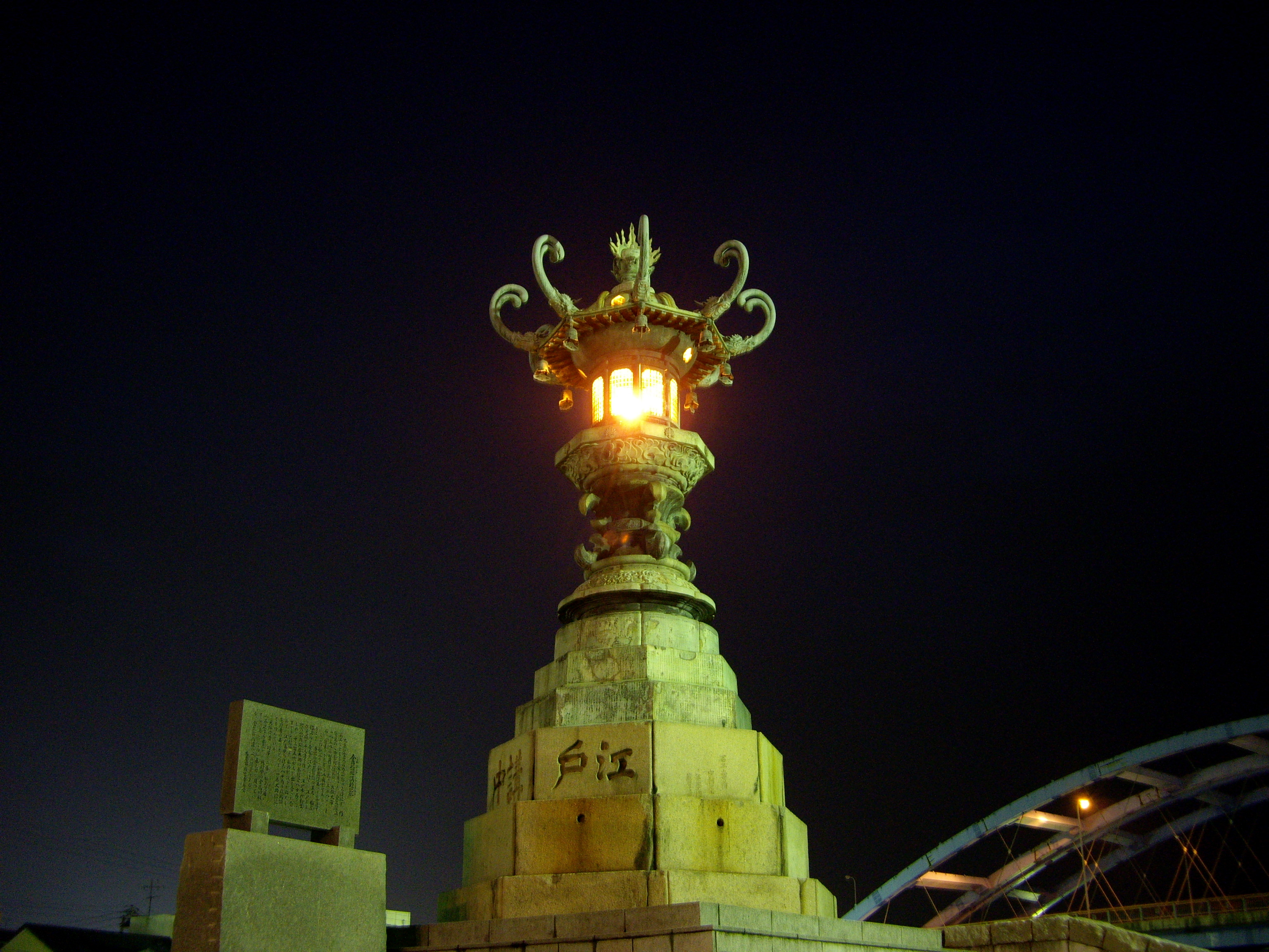 金毘羅講燈篭 - 丸亀港の歴史的な灯台、灯籠 ： 日本国香川県丸亀市